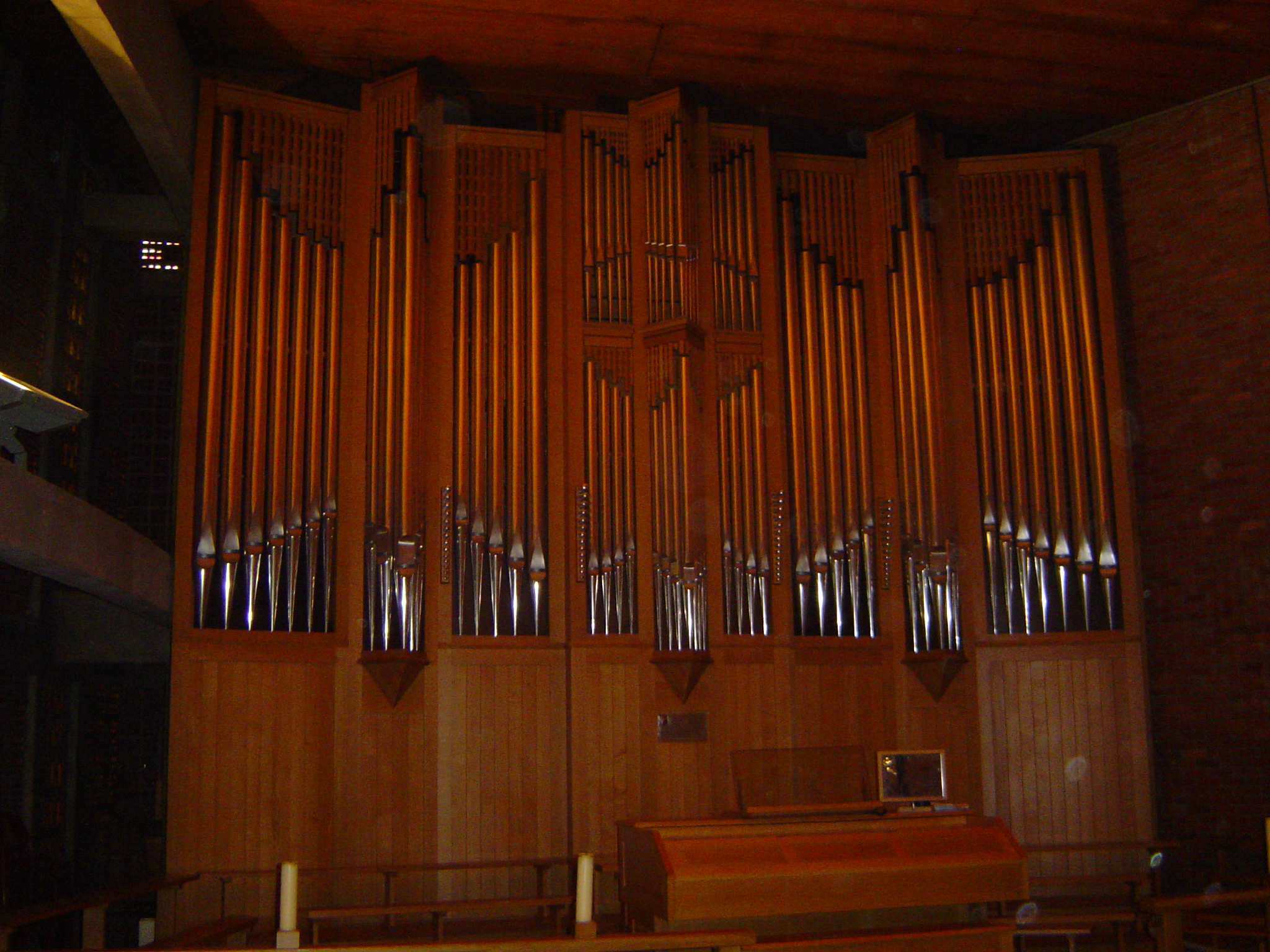 Antony-Chapelle Sainte-Marie